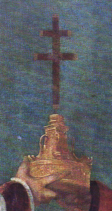 Reliquiario della santa croce (Moretto, dallo Stendardo delle Sante Croci.jpg